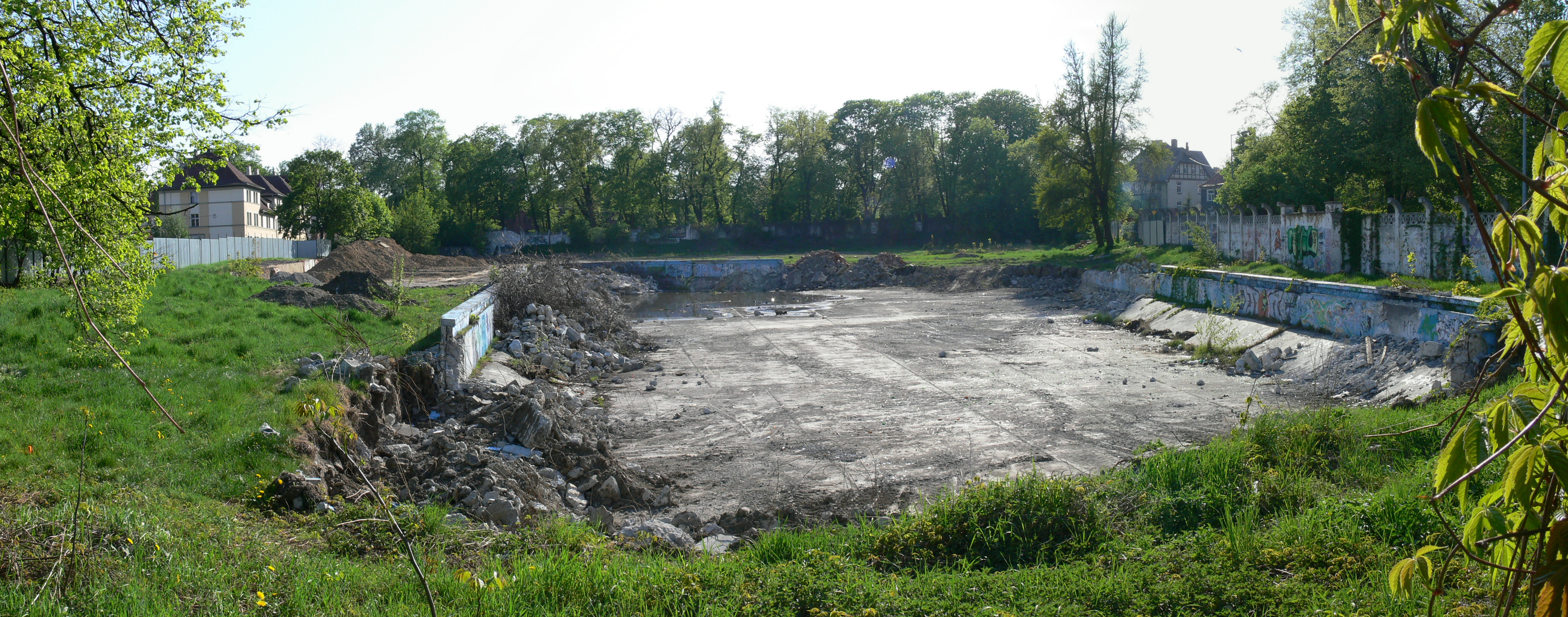 Racibórz — pozostałości po basenie miejskim przy ul. Bema